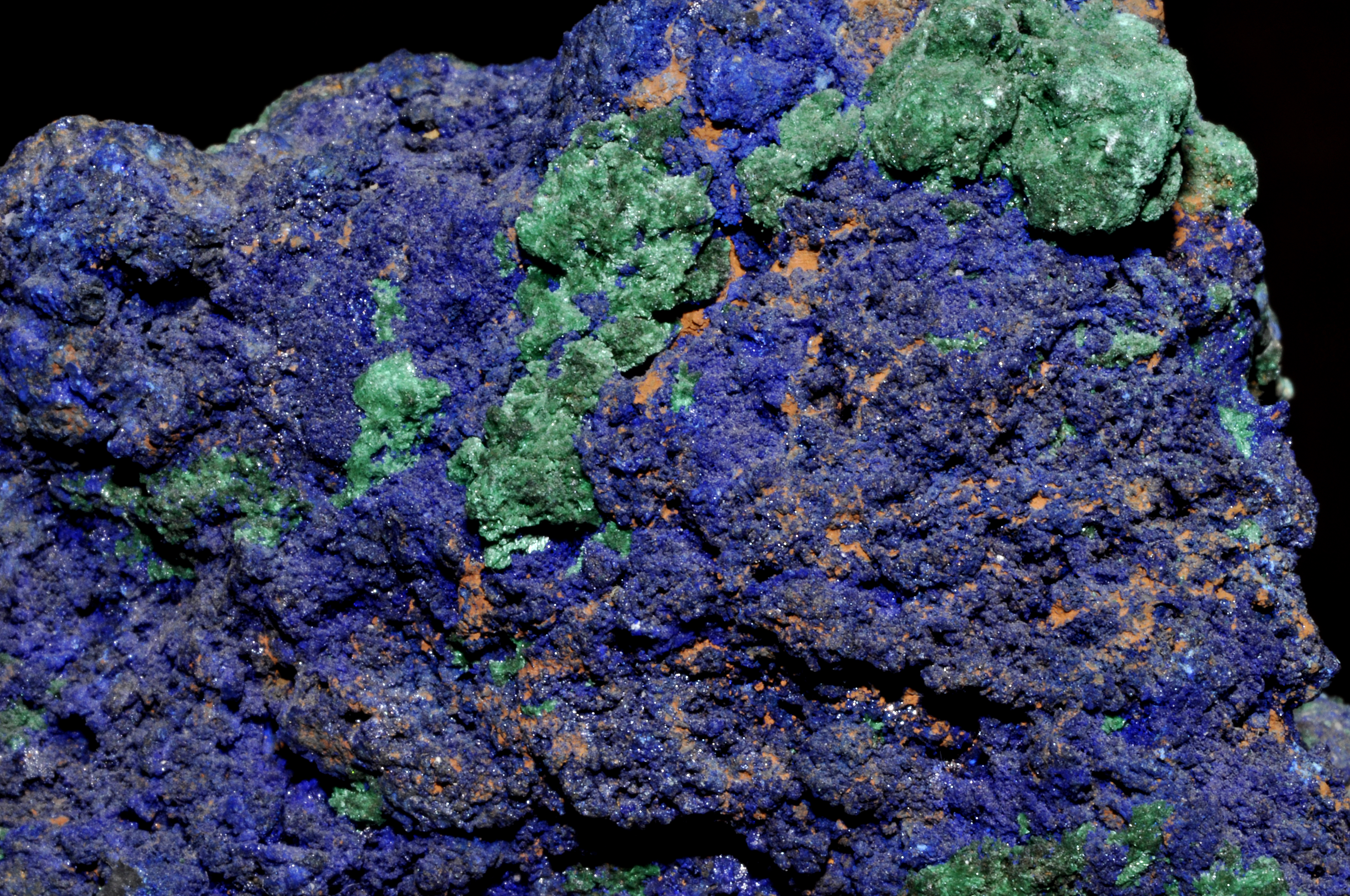 Petits cristaux d' Azurite ainsi que de petits cristaux de Malachite